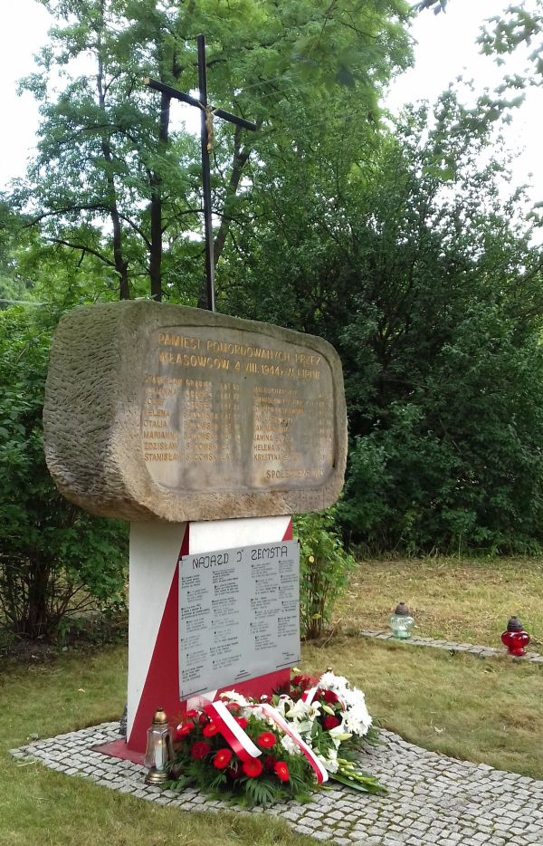 Lipno - pomnik pomordowanych przez własowców